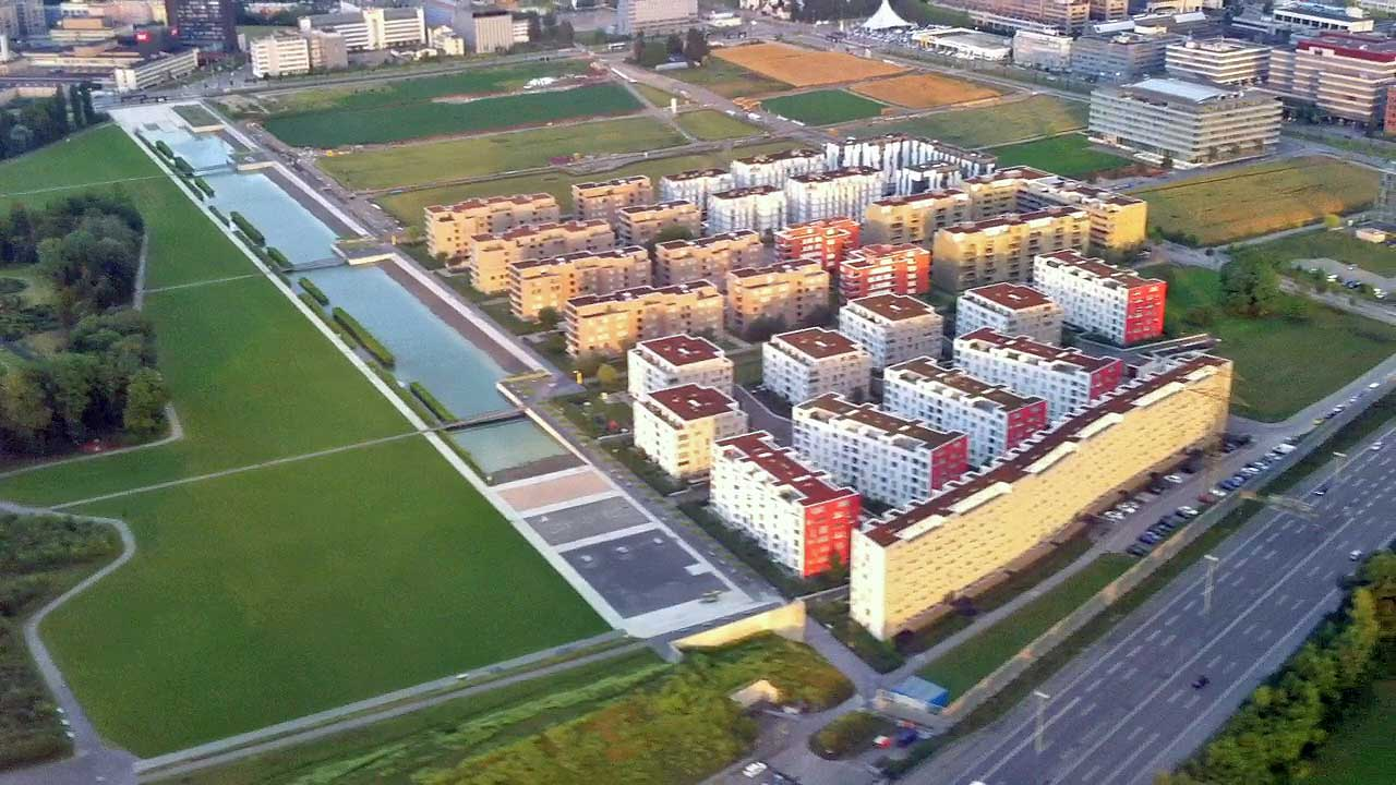 Luftaufnahme des Glattpark im Juni 2011 im Südanflug auf den Flughafen Zürich